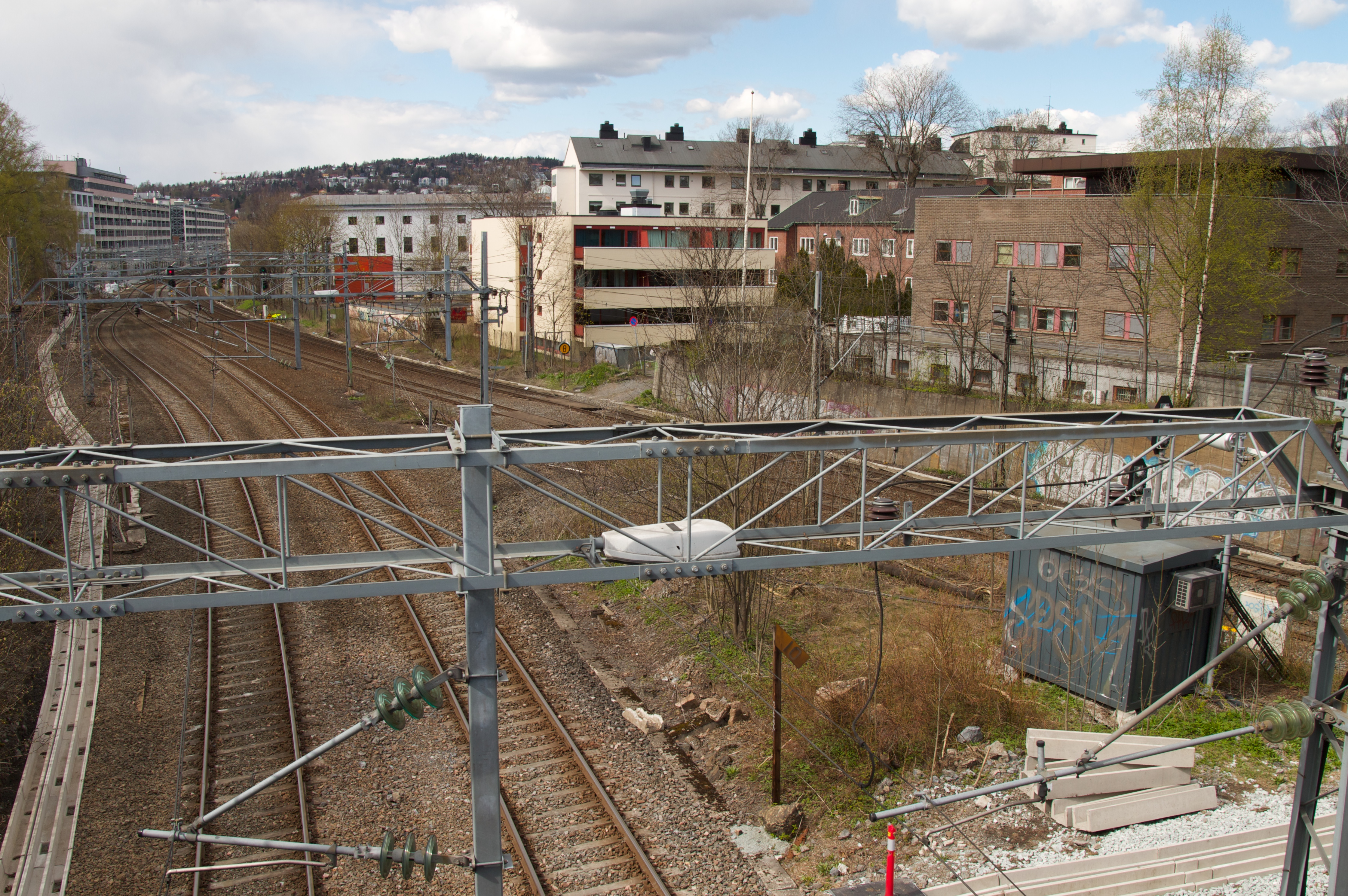 Toglinjer på Skøyen i Oslo, der Skøyen-Filipstadlinjen skiller seg fra Oslotunnelen.